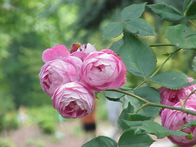 Species: Rosa sp. Family: Rosaceae Cultivar: Reine Victoria Image No. 238